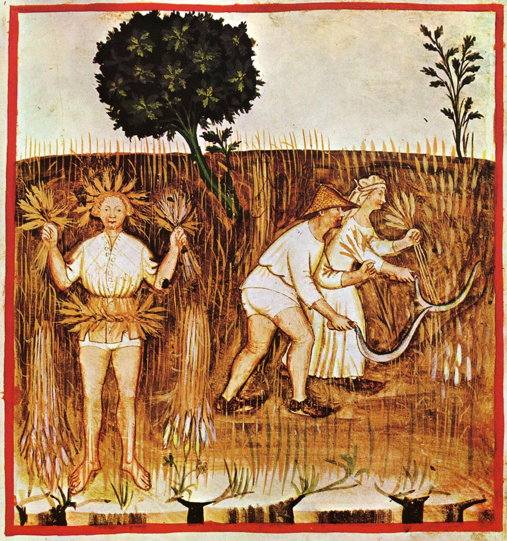 Tacuina sanitatis (XIV century)